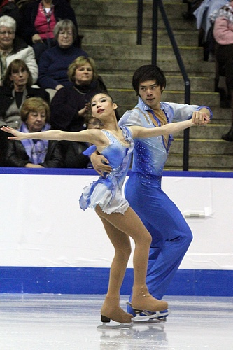 Юй Сяоюй и Цзинь Ян на 2011 Skate Canada International